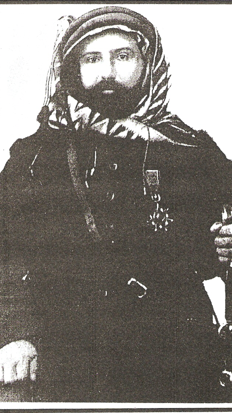 الأمير محمود الفاعور بني العباس ووسام الإستقلال غلى صدره